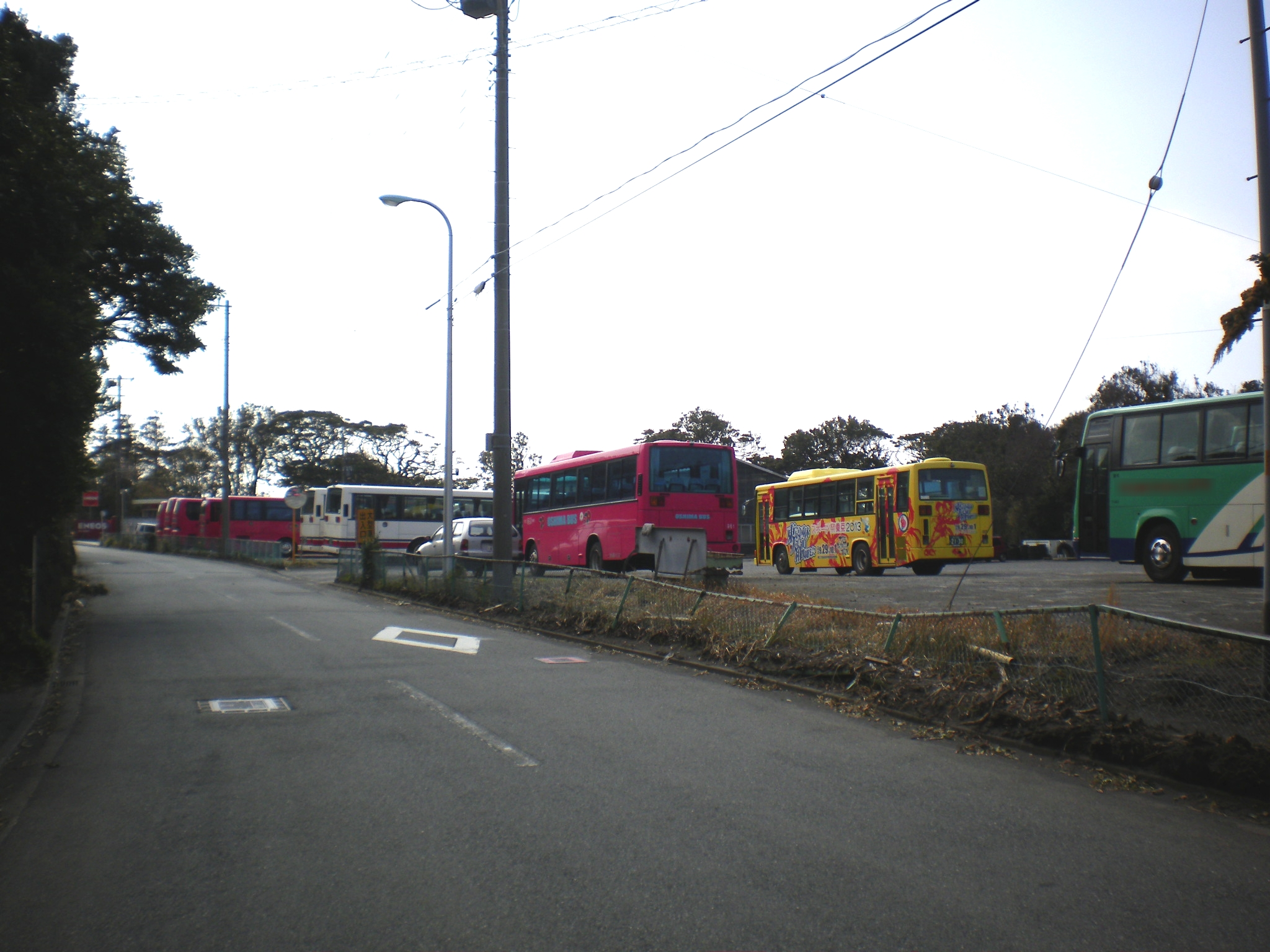 大島旅客自動車車庫